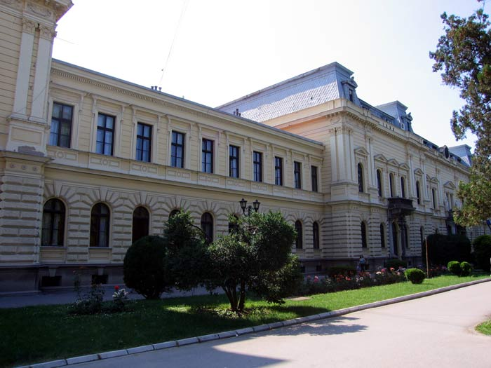 Zgrada SO Požarevac